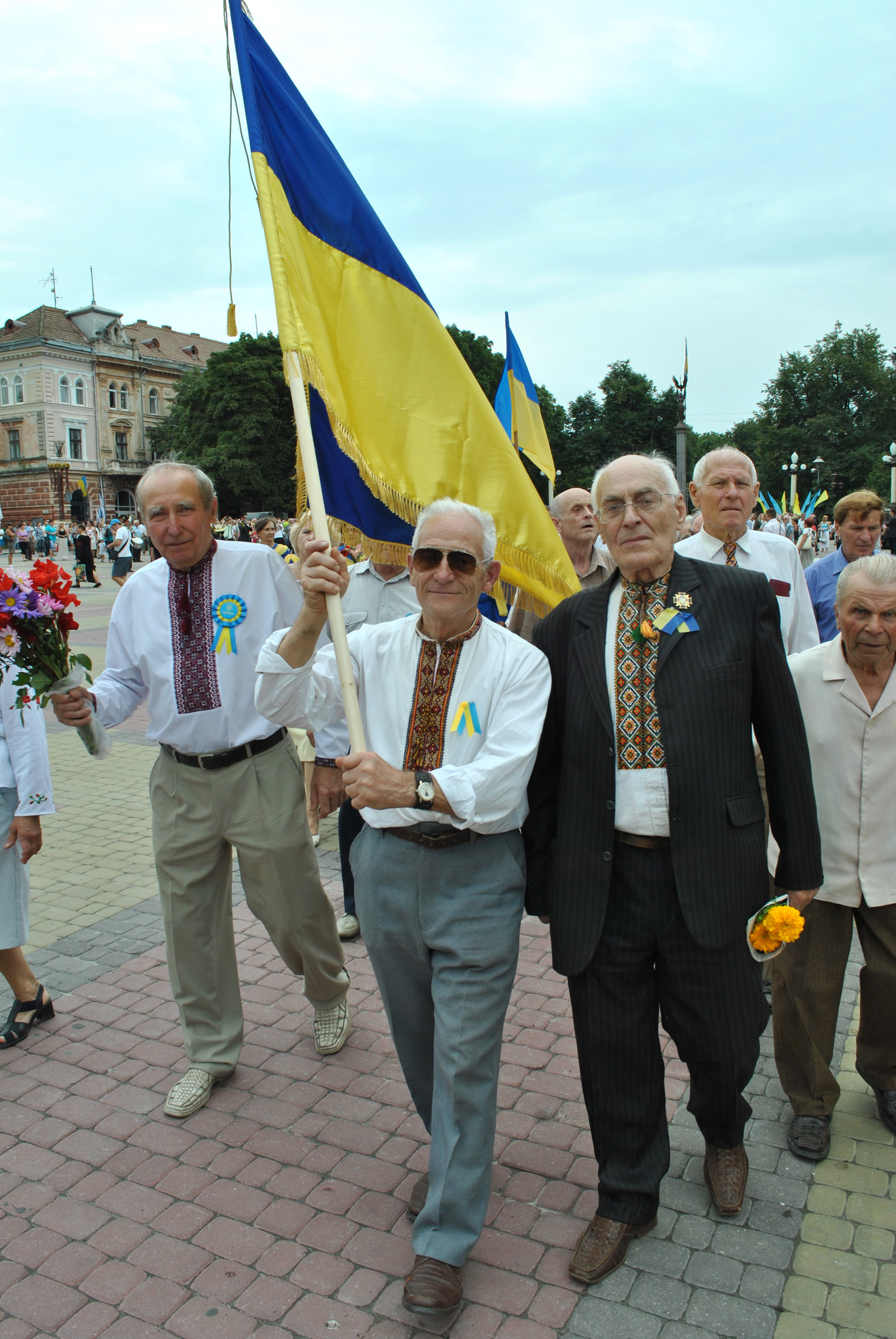 Громадсько-політичні діячі Тернопільщини у День Державного Прапора України 23 серпня 2012 року. Прапороносець — старший науковий працівник історико-меморіального музею політичних в'язнів Ігор Олещук.